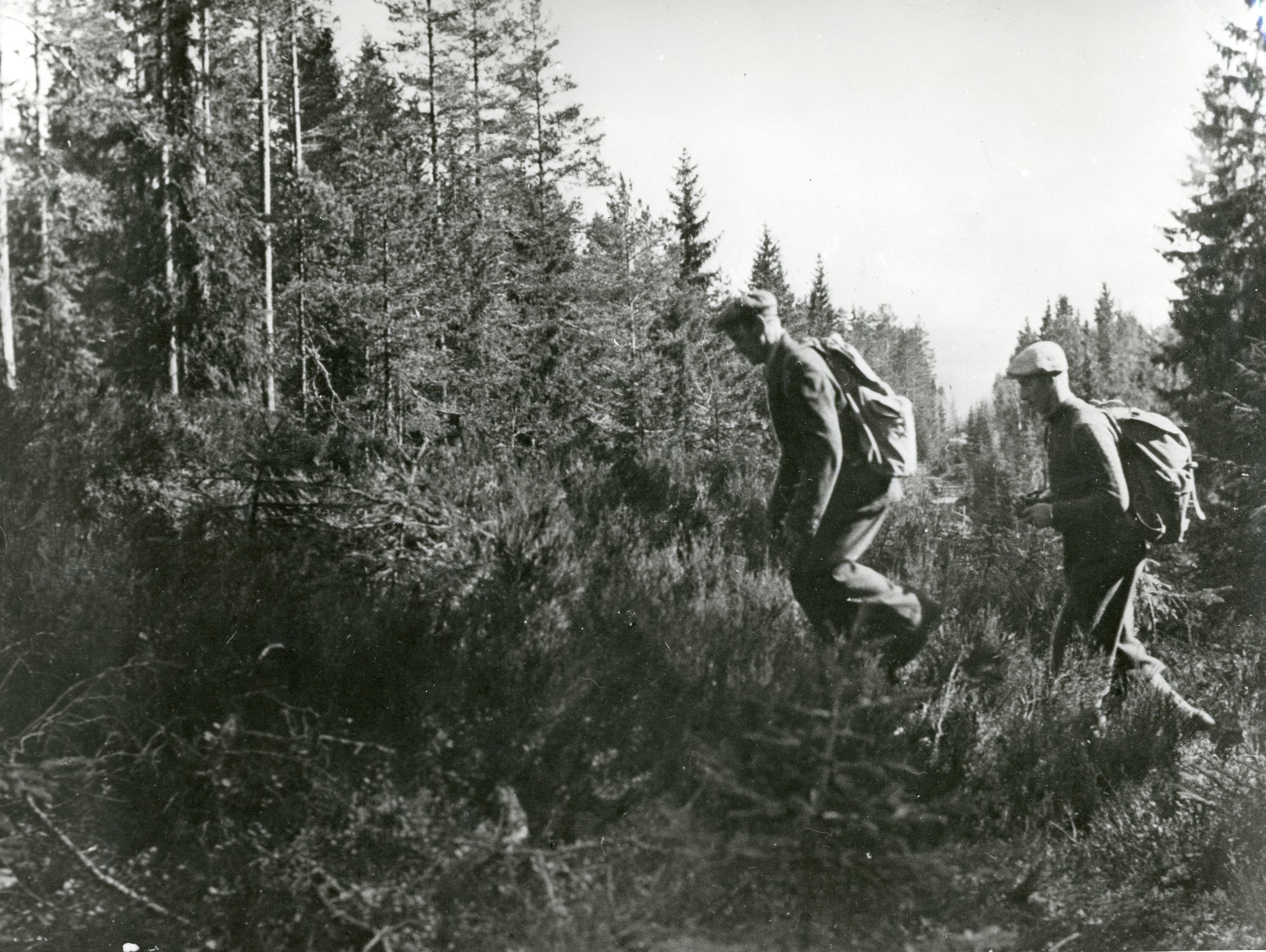 Norske flyktninger over grensen til Sverige. Bildet er tatt idet noen flyktninger passerer den brede gaten som er hugget i skogen for å markere grensen. RA/Pa-1209/Uc¬¬/68/1/S 5781